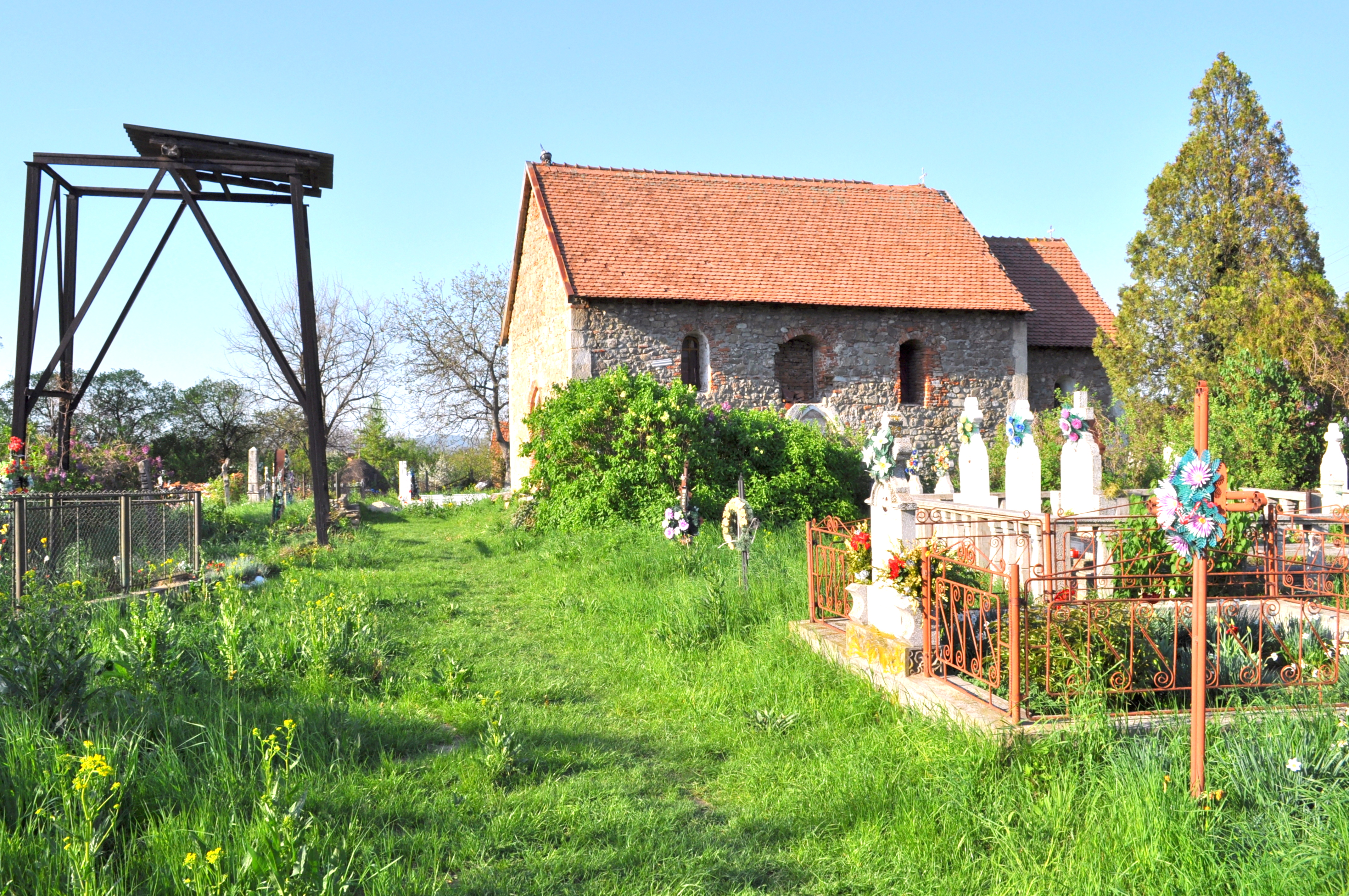 Biserica "Sf. Mare Mucenic Gheorghe", sat SÂNPETRU; comuna SÂNTĂMĂRIA-ORLEA